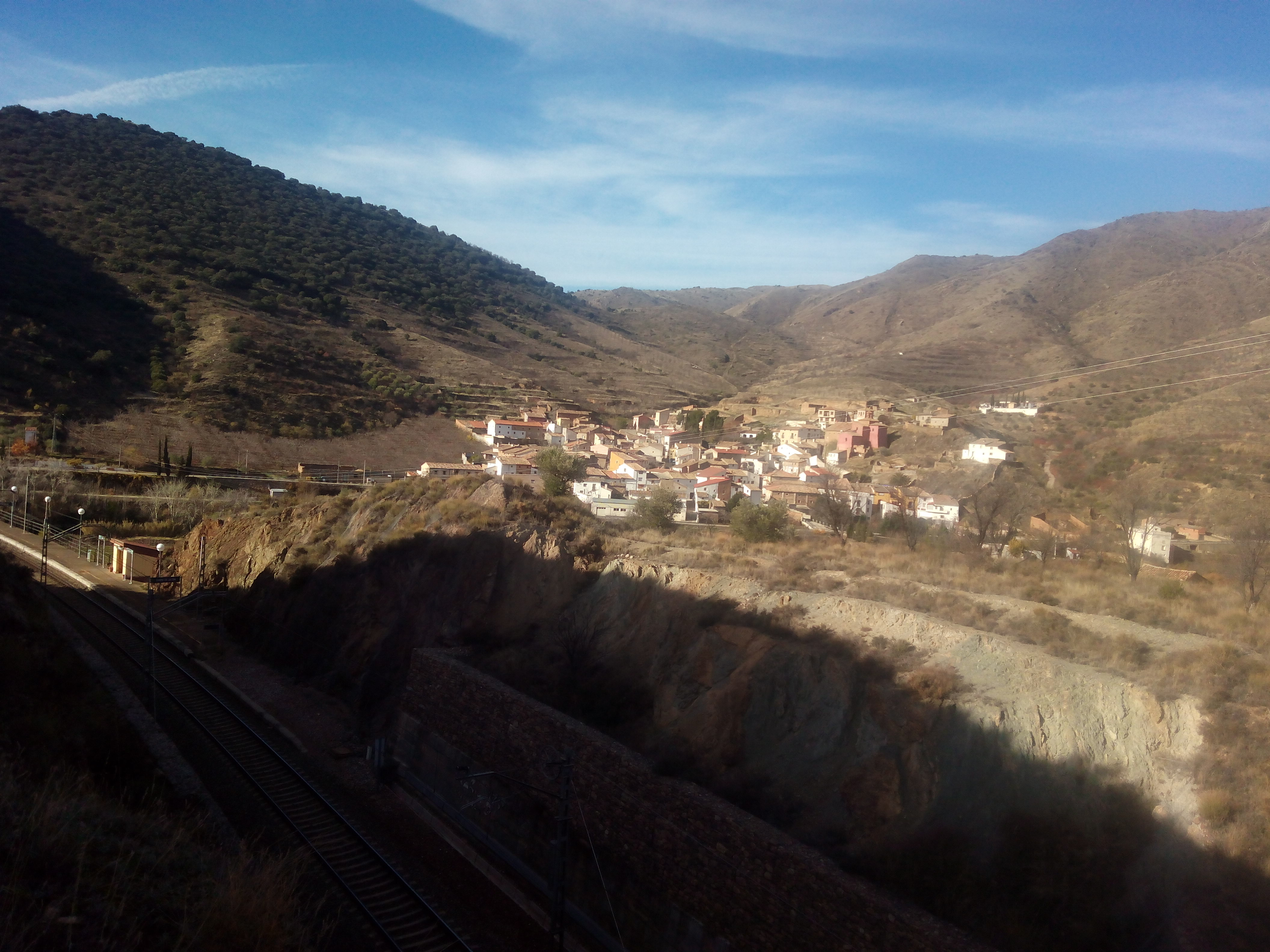 Vista de Embid y su apeadero